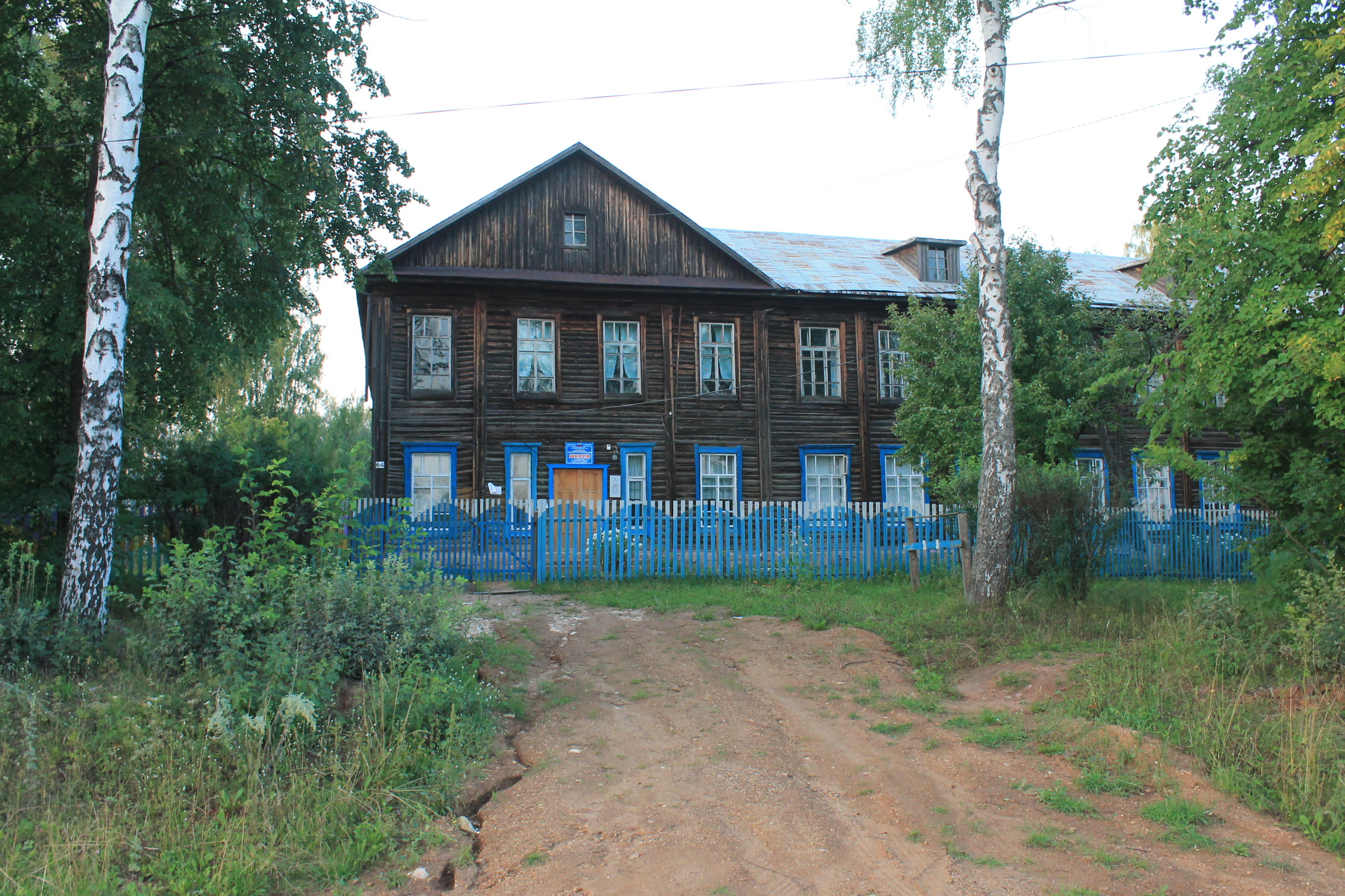 Дамаскинская школа